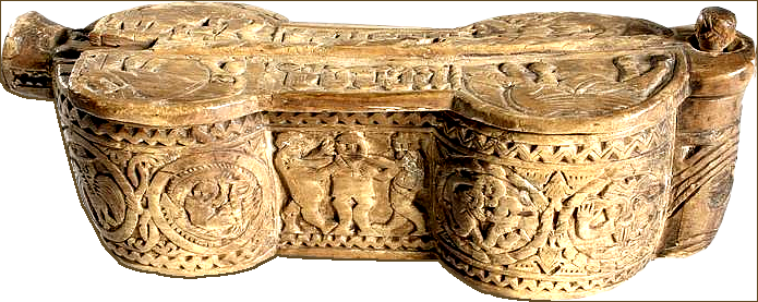 Spónastokkur Teits Þórðarsonar. Spónastokkur frá 1550-1600, kominn frá Eiðsstöððum í Blöndudal. Spónastokkurinn er með höfðaletri. Hann var notaður til að geyma í hornspæni og matskeiðar.